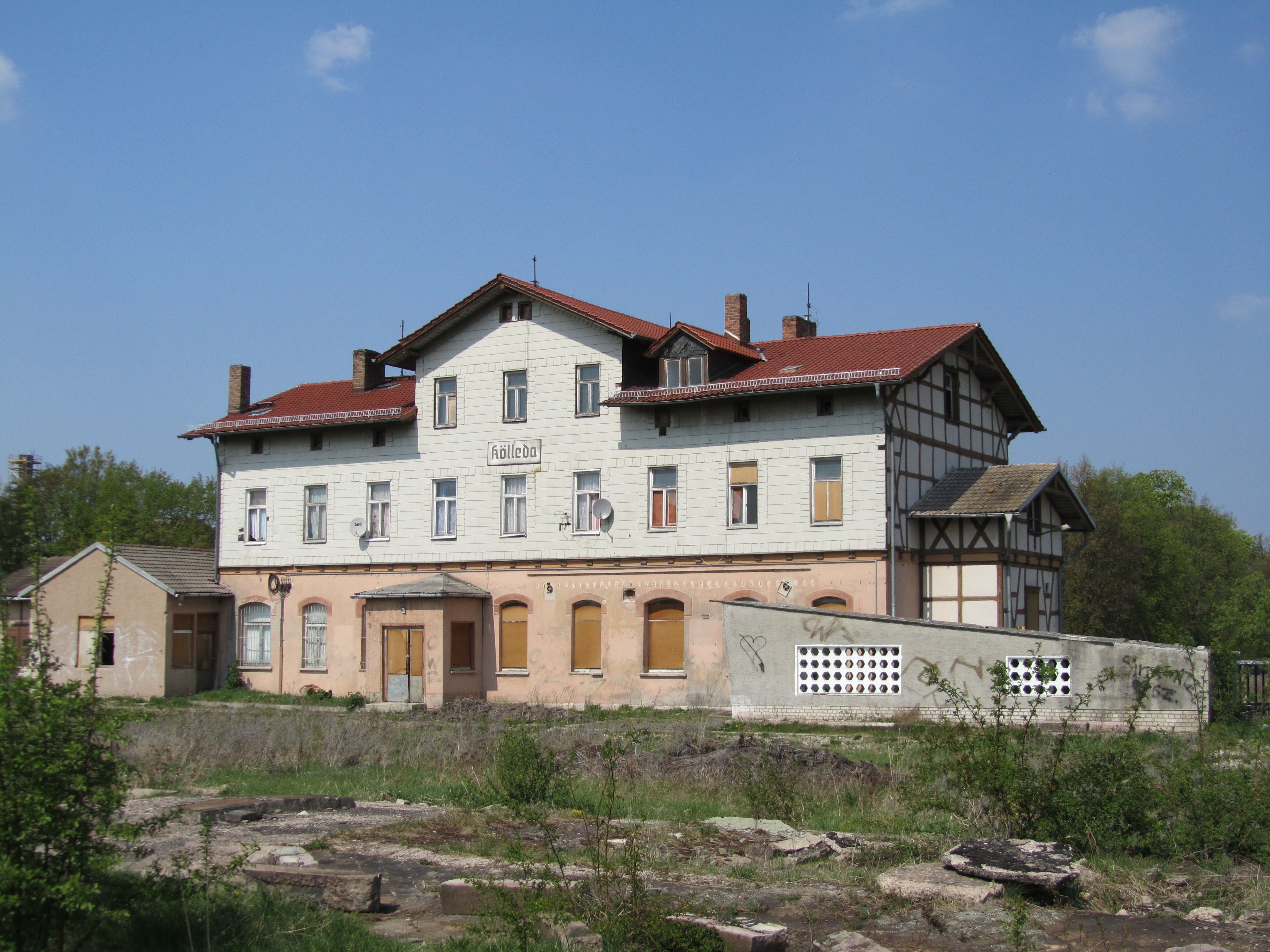 Das Bahnhofsgebäude von Kölleda (Thüringen).